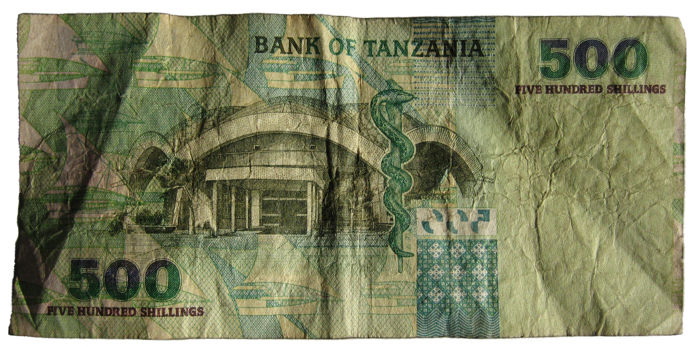 500 Tanzanian shillings note, back